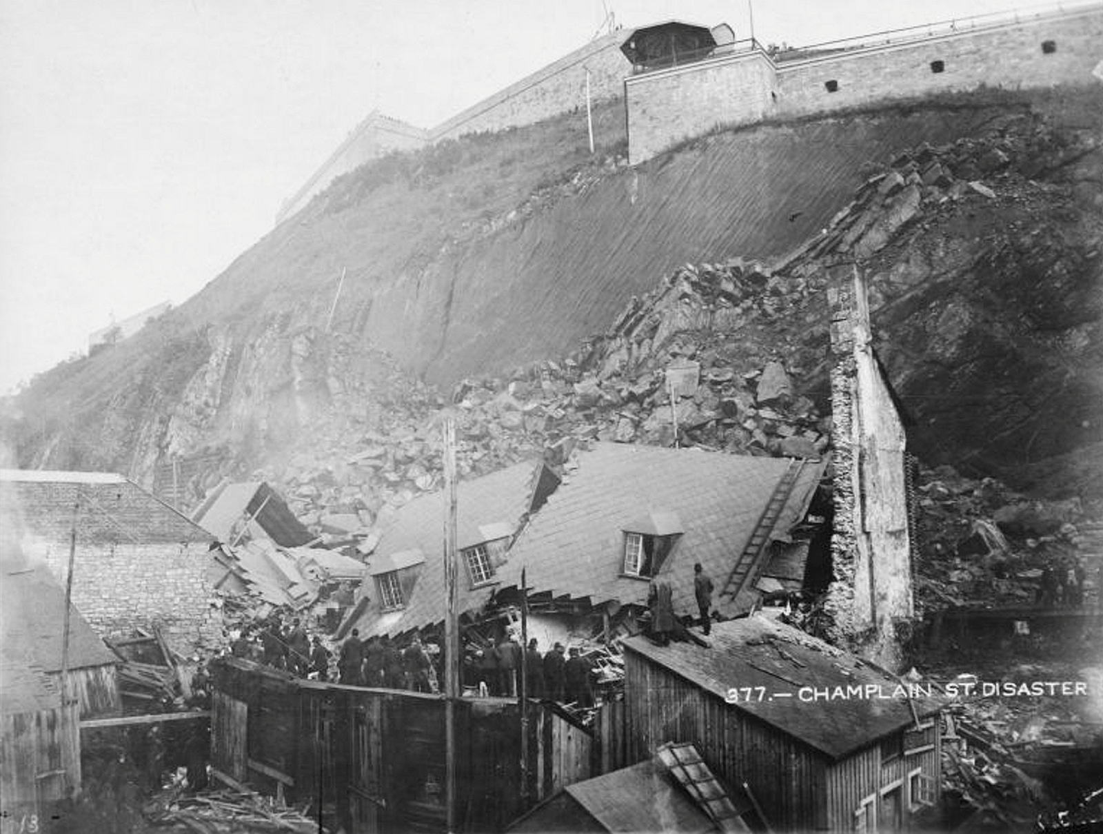 L'Éboulis du cap Diamant vu de la Basse-Ville de Québec